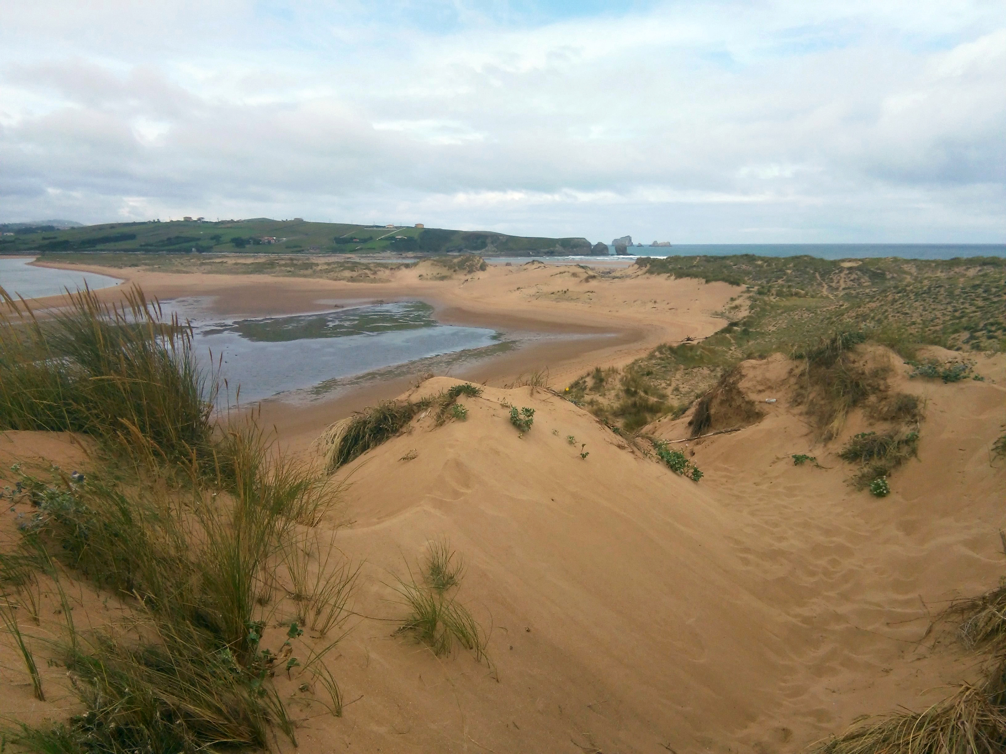 Dunas de Liencres This is a photography of a Special Area of Conservation in Spain with the ID: ES1300004. Natura2000 entry, EEA entry